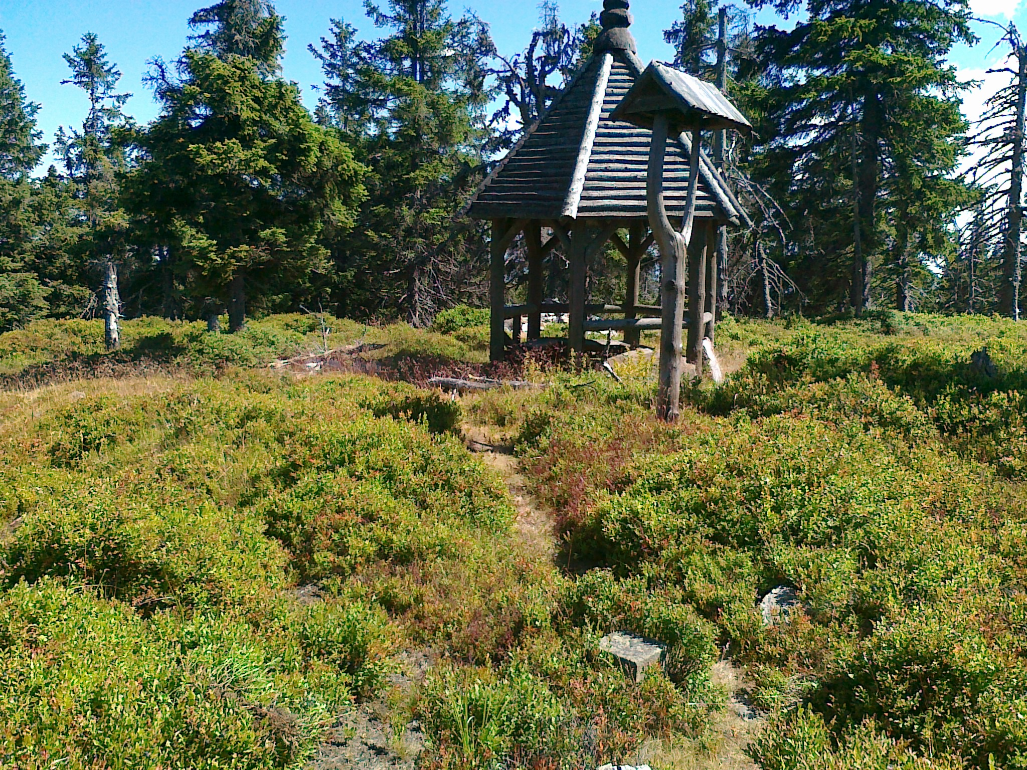 Połać szczytowa góry Ostružná - 1184 m n.p.m.